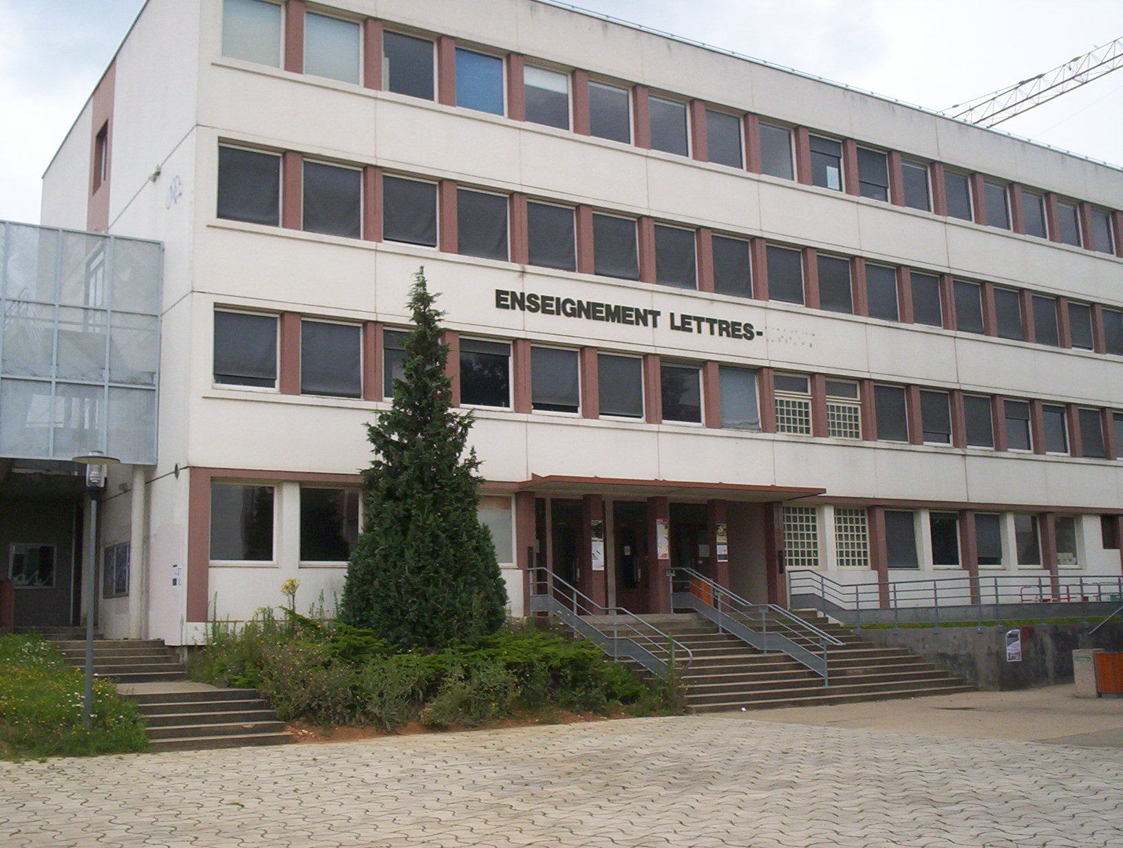 Le bâtiment lettres sur le campus Ouest de l'université du Maine